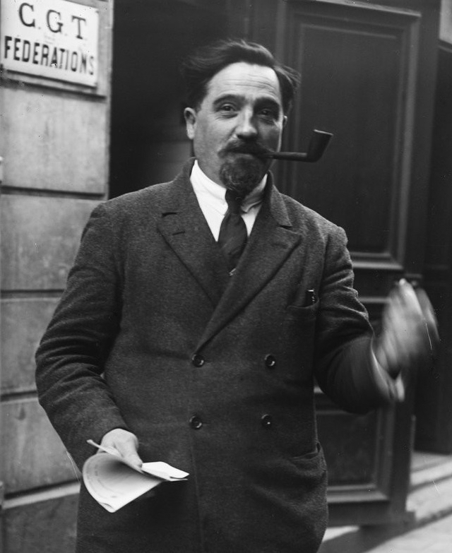 Georges Dumoulin (1877-1963), en 1920.